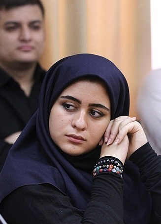 فاطمه بهارمست